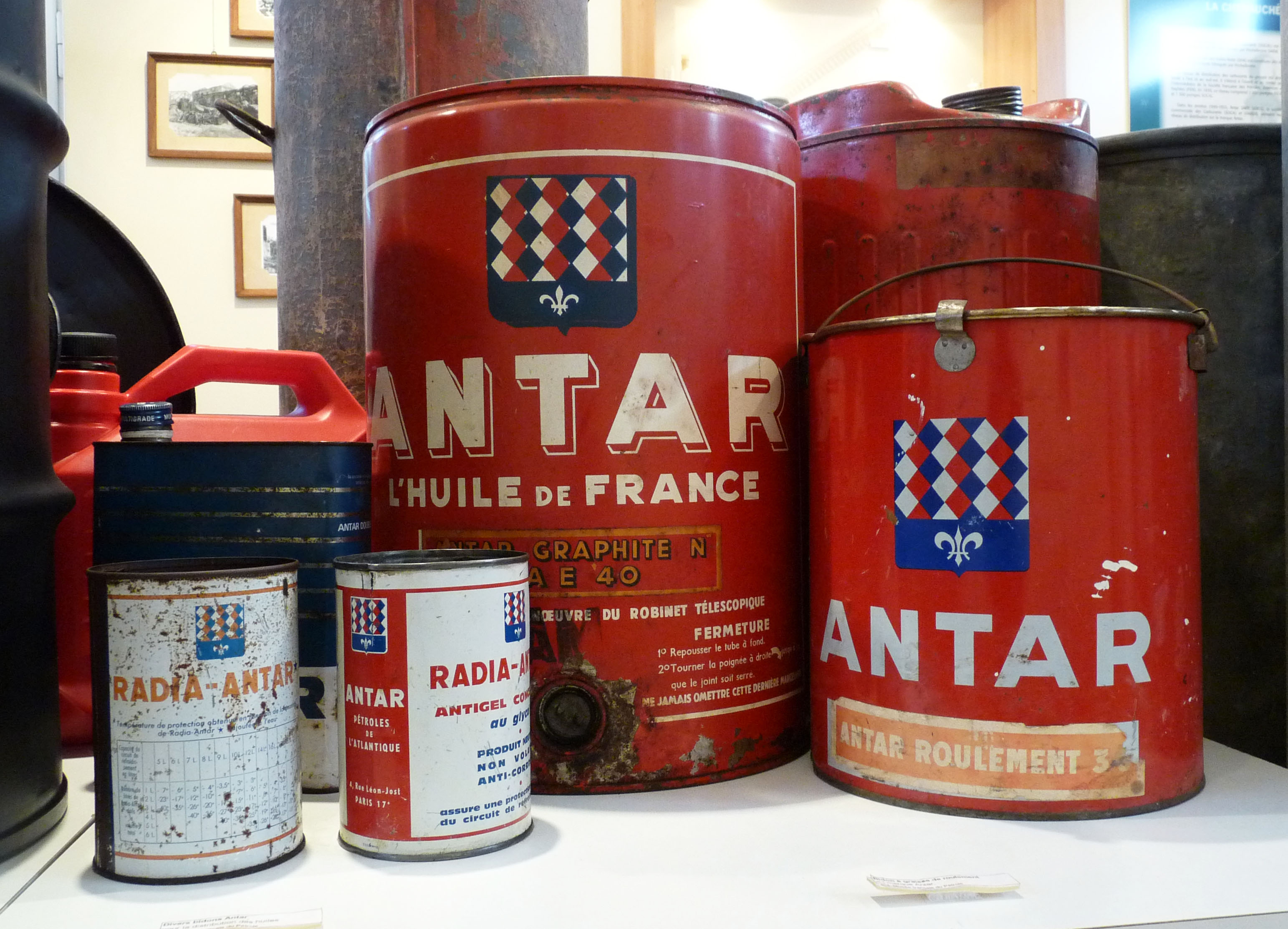 Musée français du pétrole à Merkwiller-Pechelbronn (Bas-Rhin) : Produits Pechelbronn commercialisés sous la marque ANTAR. A droite un bidon de graisse à roulement.